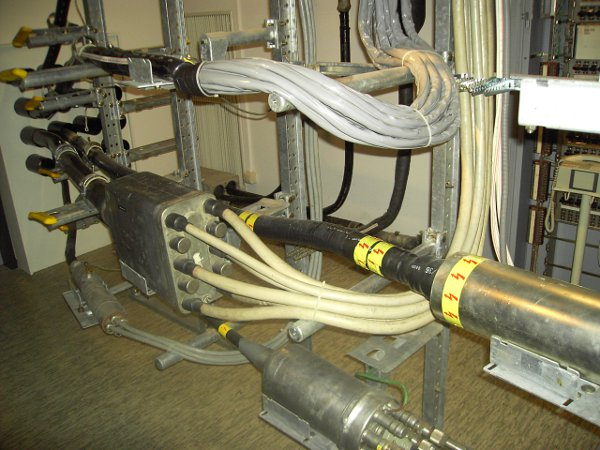 Bild zeigt die Kabeleinführung im Keller einer Vermittlungsstelle mit den daran angebrachten Muffen. Dort werden die dicken Kabel in kleinere Kabel aufgeteilt. Diese führen dann zum Hauptverteiler. Unten ist die Verbindung mit "ATOK" zu sehen, oben erfolgte eine muffenlose Aufteilung mit "Zipperschlauch"; hier wurde der schwarze PE-Mantel des Hauptkabels entfernt. ATOK und Zipperschlauch sind hellgrau.